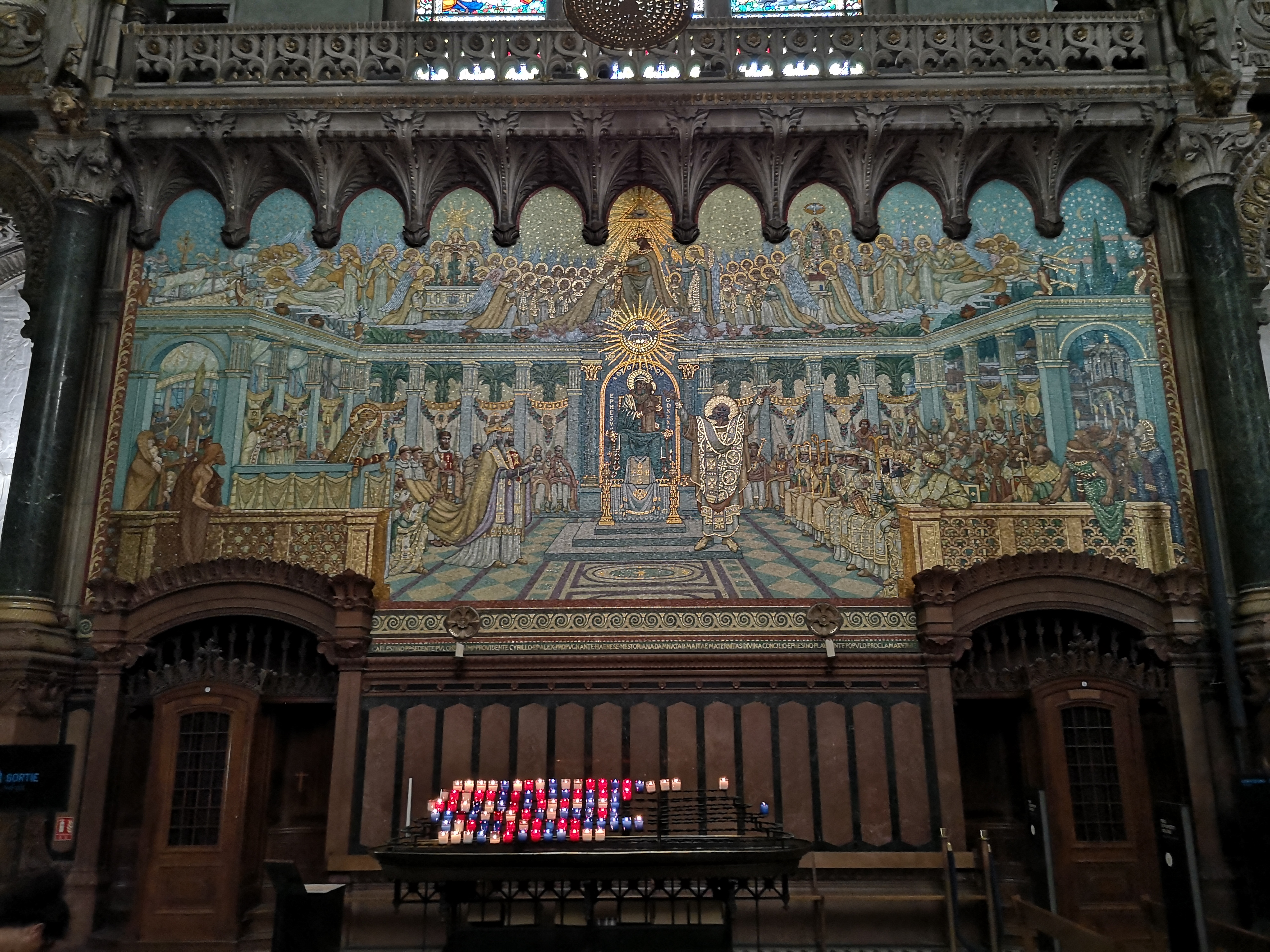 Intérieur de Basilique la Notre-Dame de Fourvière, Lyon.